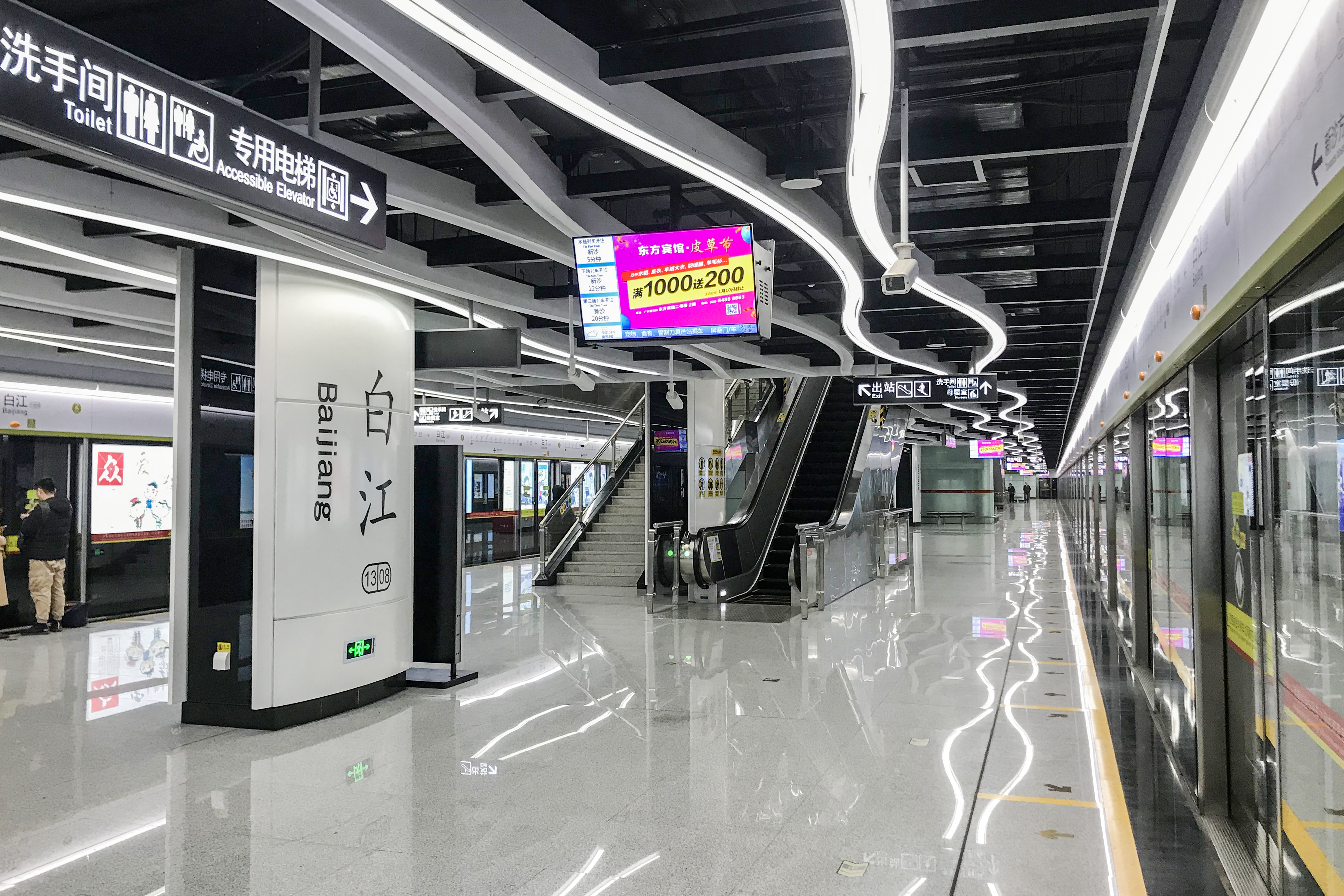 广州地铁白江站